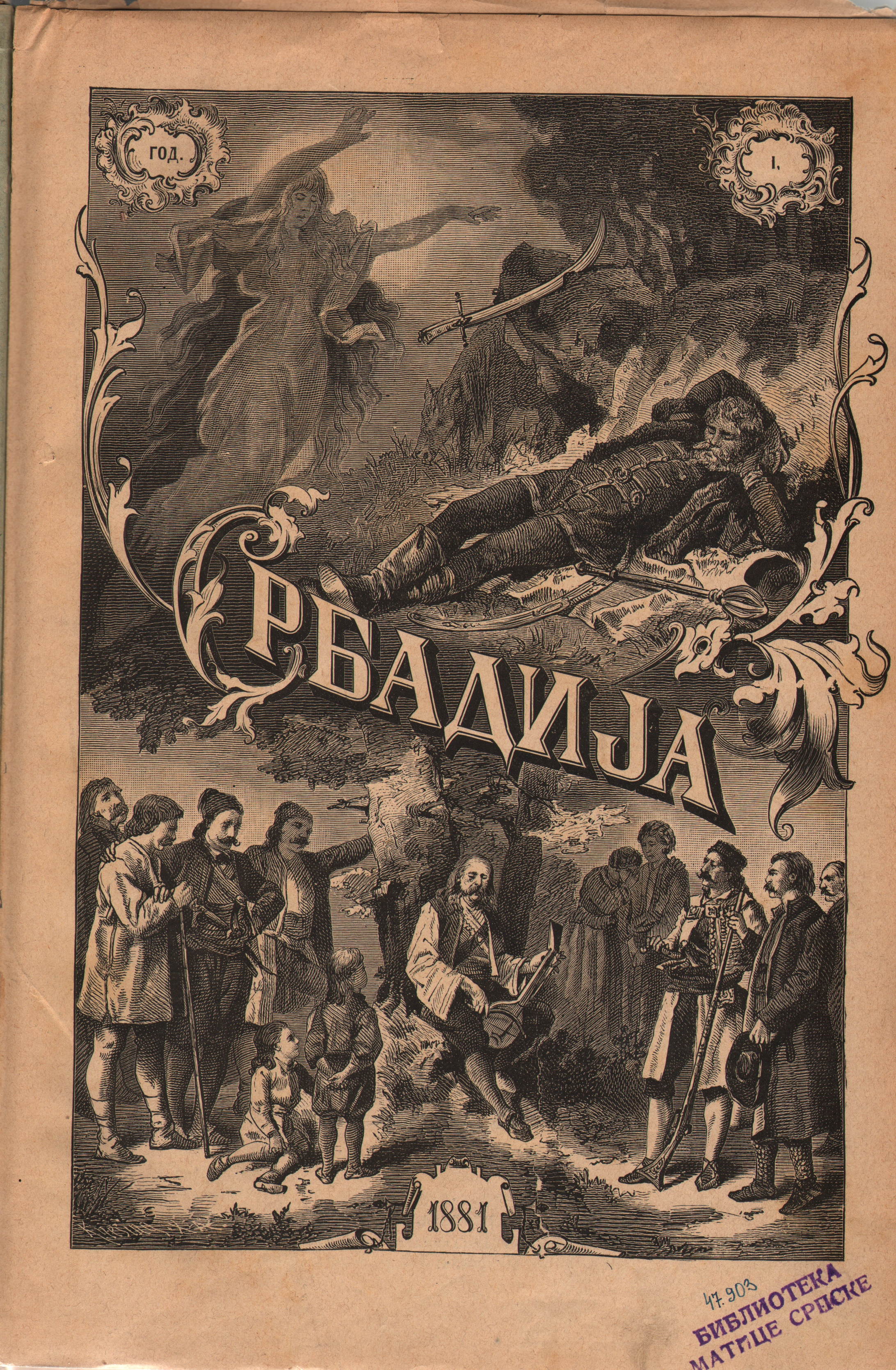 Србадија. Часопис за забаву и поуку, ур. Стеван Ћурчић, год. 1, Београд 1881.